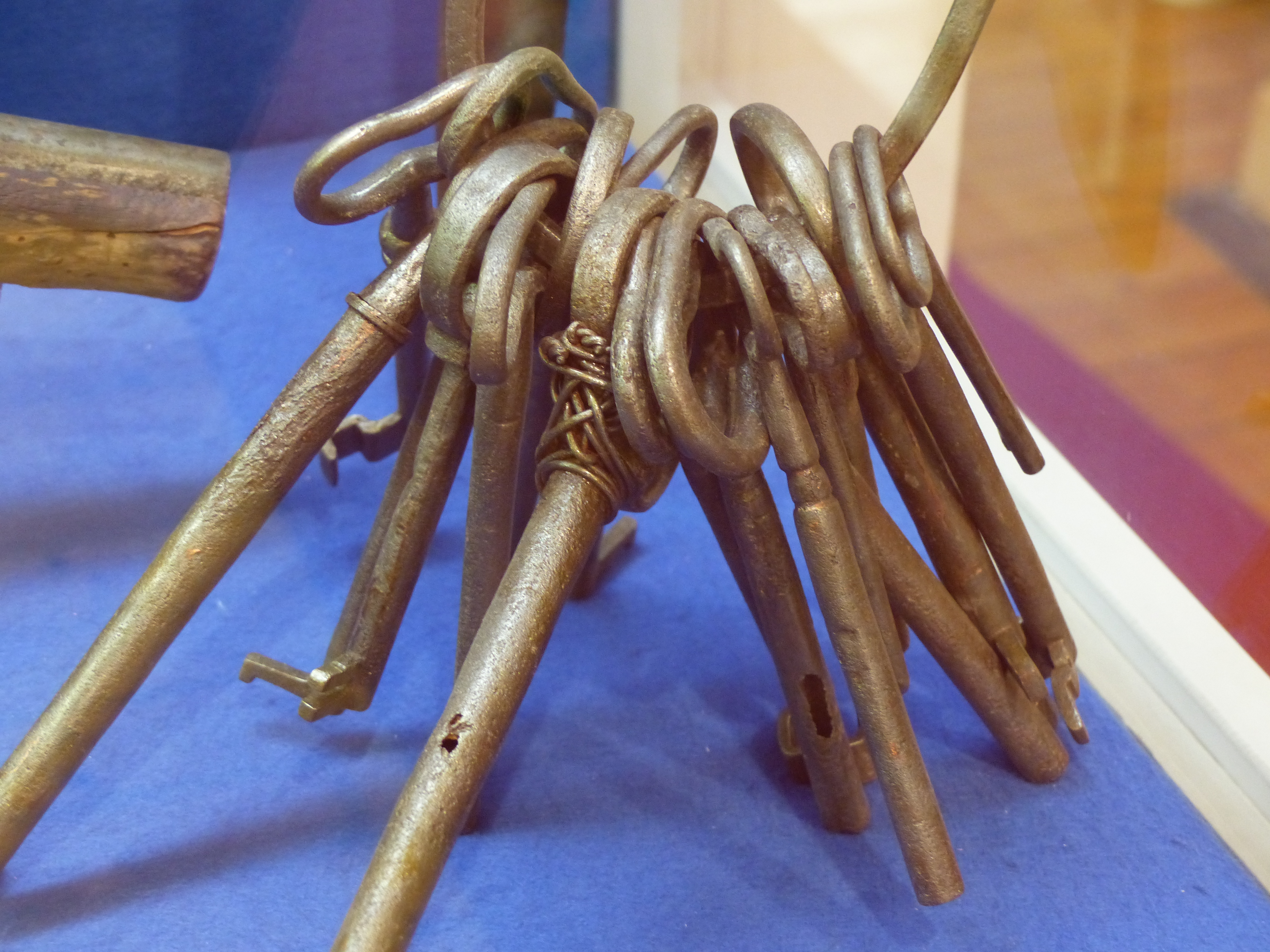 Nachschlüsselbund der Räuberbande "Stradafüßler"